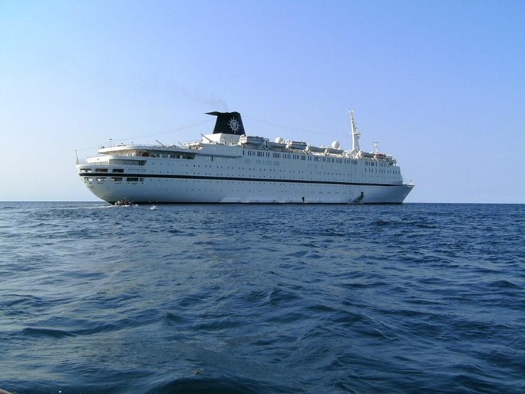 MSC Melody